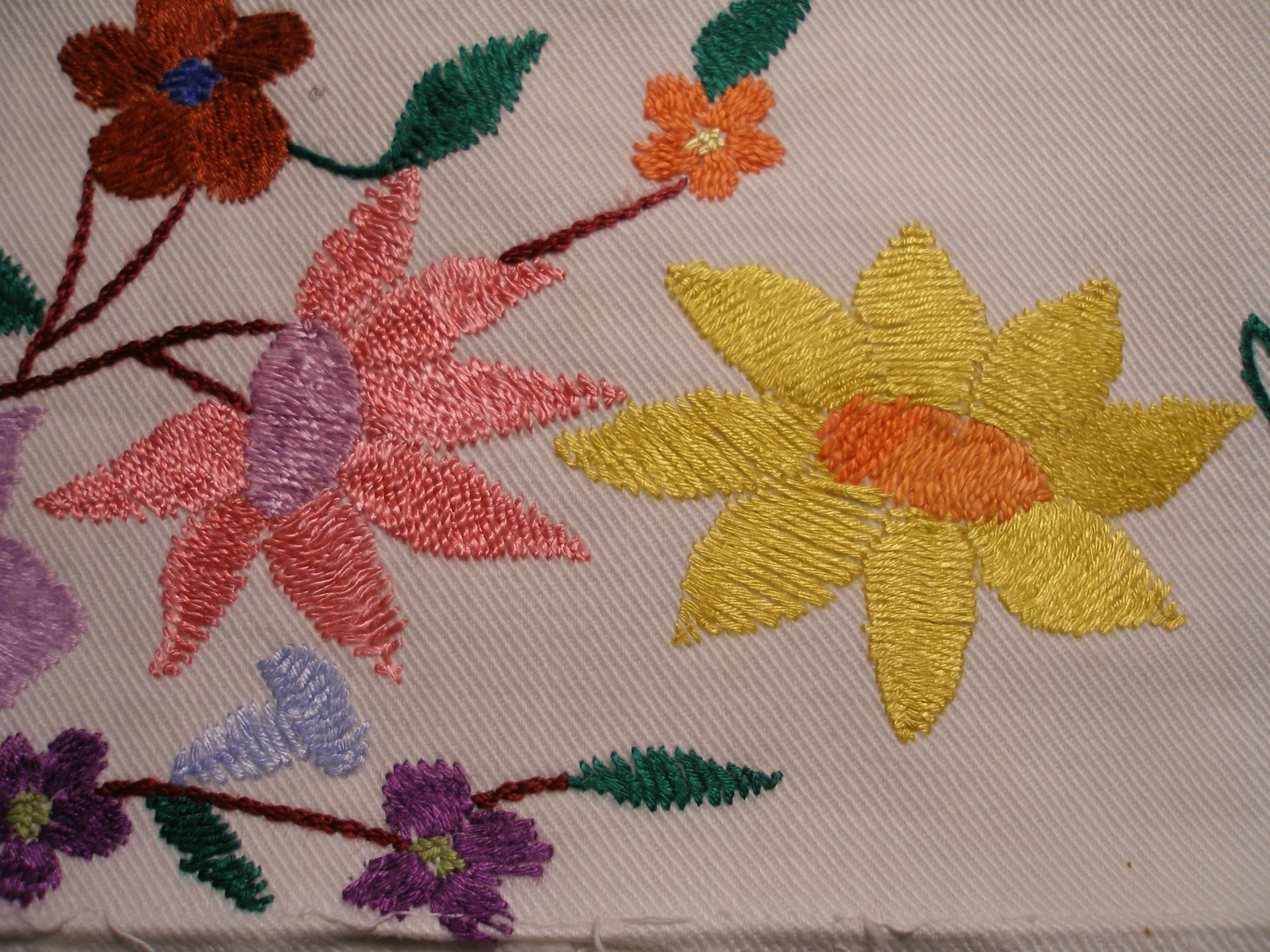 Verona Kotuličová: ručná ozdobná výšivka z roku 1944. Detail. Obec Sedlice región Šariš.